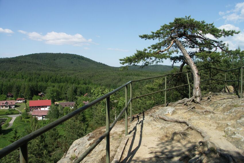 Havran, Polesi, Czech Republic